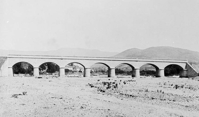 Imatge